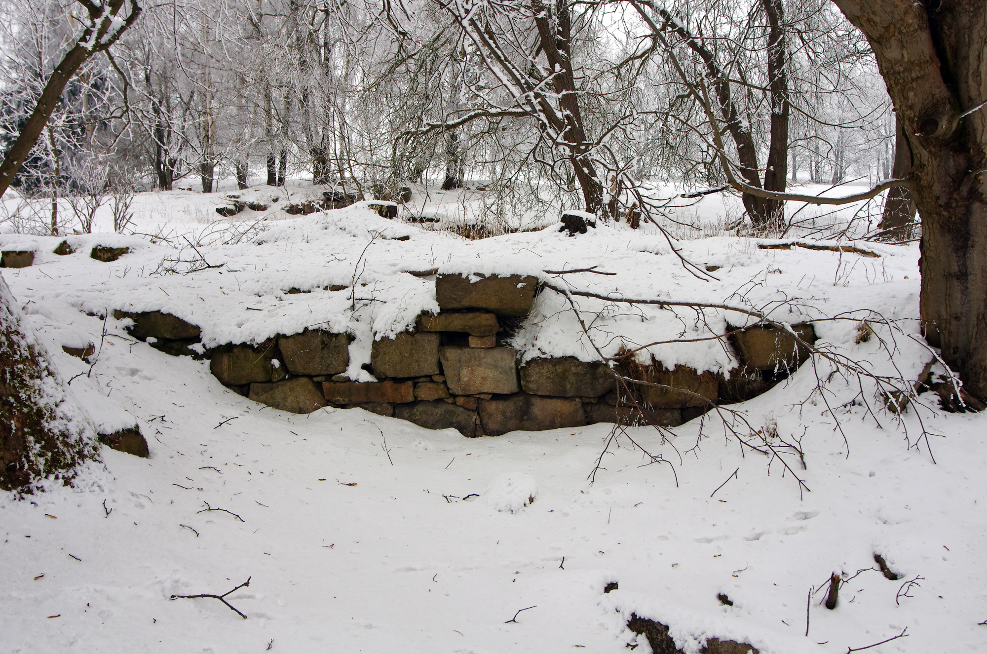 Milíře u Šindelové - zaniklá obec, pozůstatky bývalého stavení, okres Sokolov